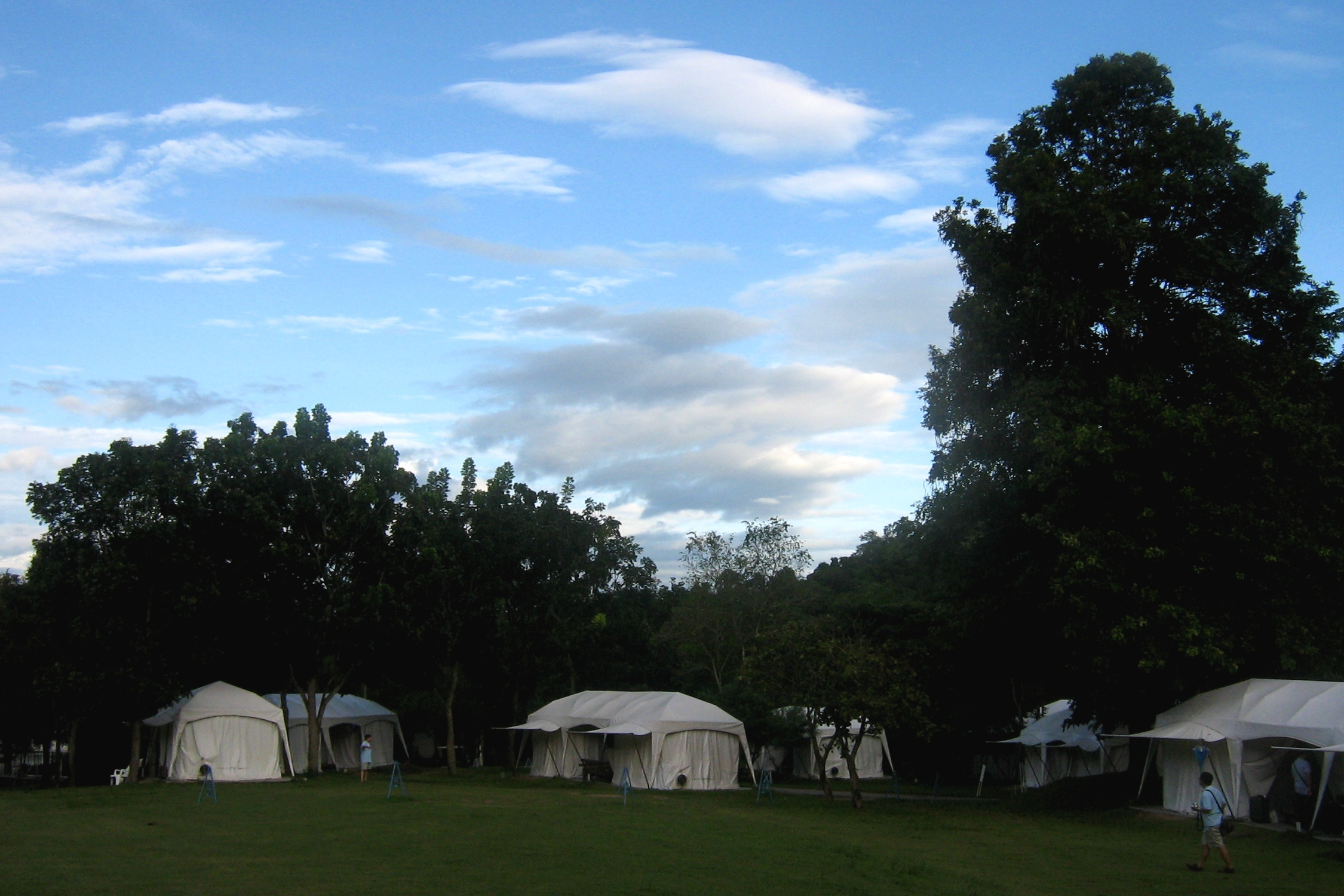 Es-ta-te Camp, Khao Keaw Open Zoo